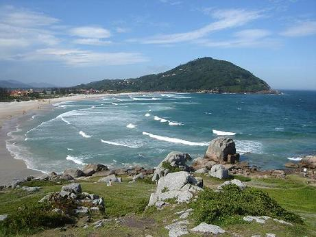 Praia da Ferrugem, Garopaba, Santa Catarina State, Brazil